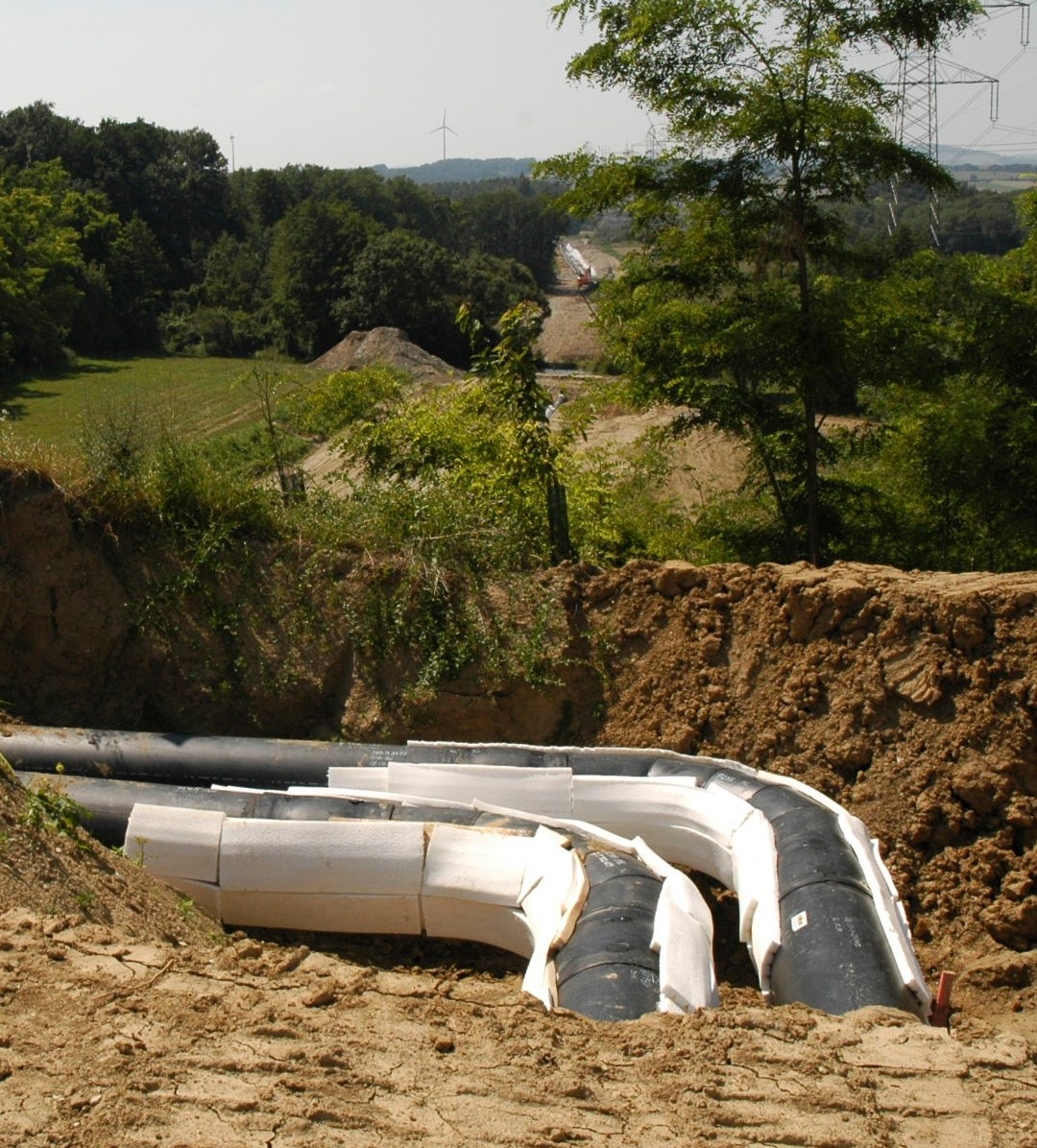 Dehnpolster (weiß) eines Kunststoffmantelrohres mit einem Aussendurchmesser von 630 mm und einem Mediumsrohrdurchmesser von 400 mm. Betriebsdruck der Leitung 40 bar bei 140°C. Im Hintergrund sieht man den weiteren Trassenverlauf. Längste Fernwärmetransportleitung Österreichs mit 31 km Gesamtlänge